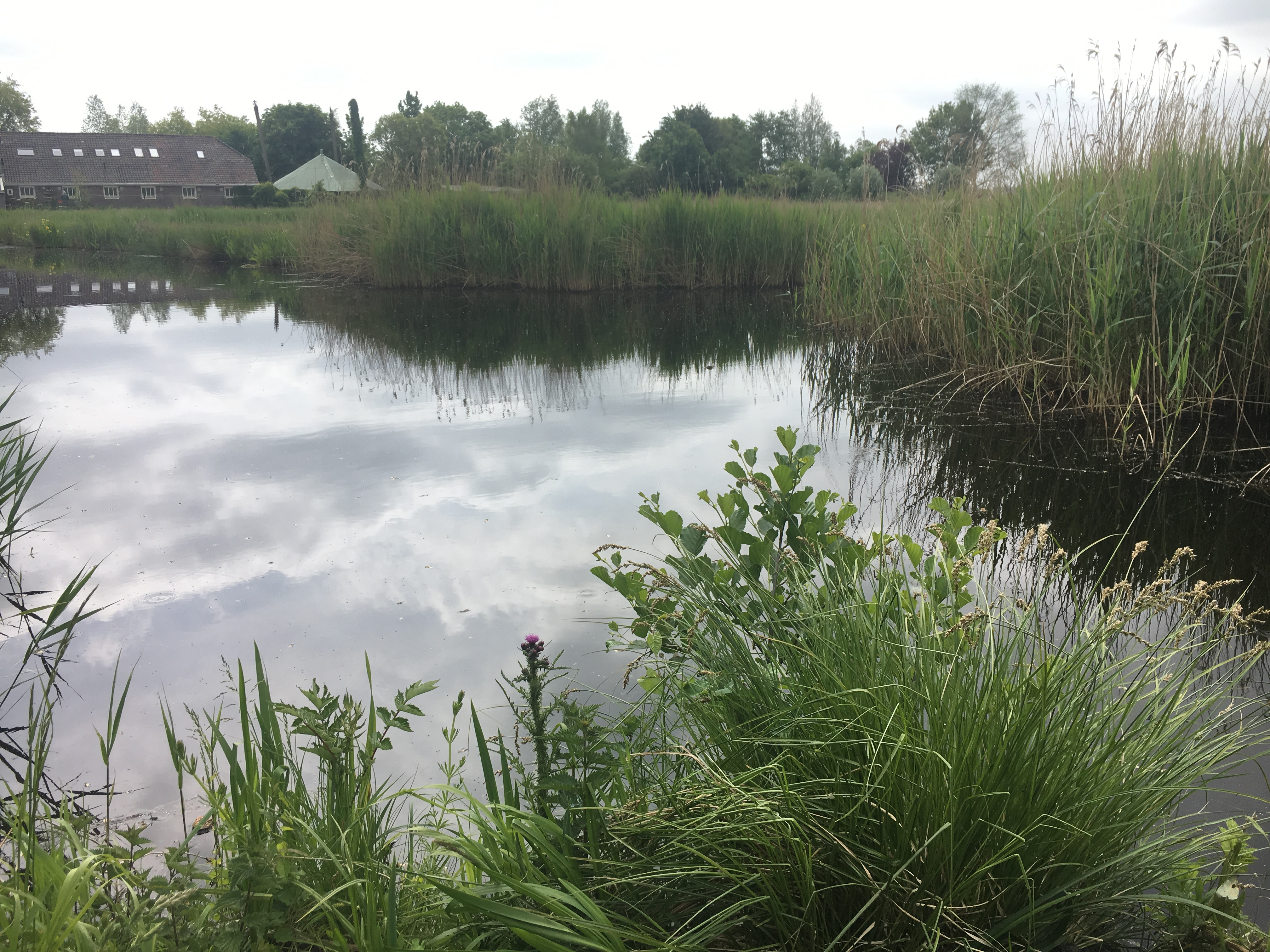 landschap De Bovenladen